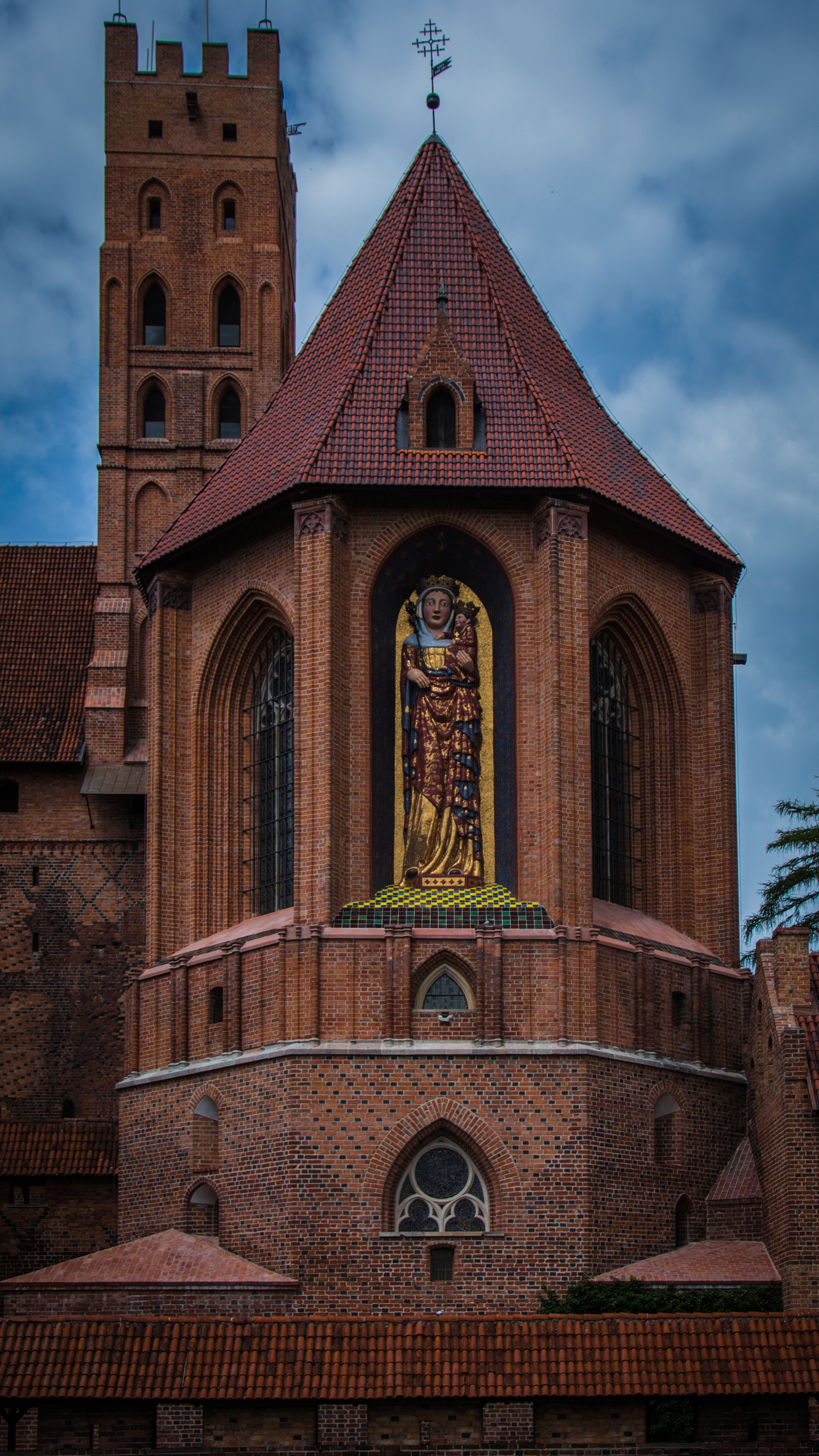 Malbork, Zamek w Malborku Wikidata has entry Q71279 with data related to this item.